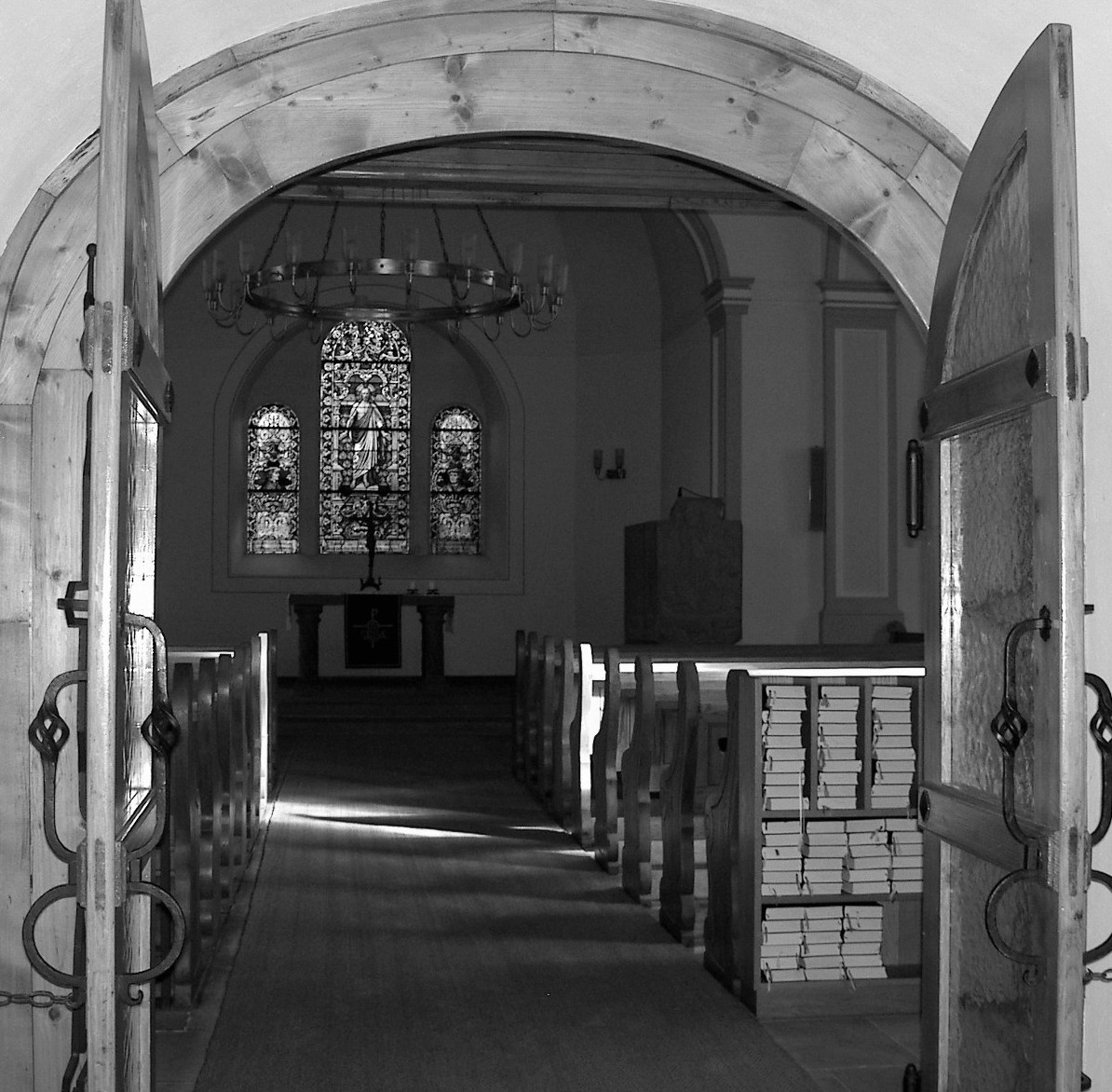 Blick durch die Eingangstüre der Evangelischen Kirche von Trippstadt, Chorfenster von 1895 (ausführende Werkstatt unbekannt), siehe: Anke Elisabeth Sommer: Glasmalereien der Protestantischen Landeskirche der Pfalz. Verlag Schnell und Steiner, Regensburg 2007, S. 73